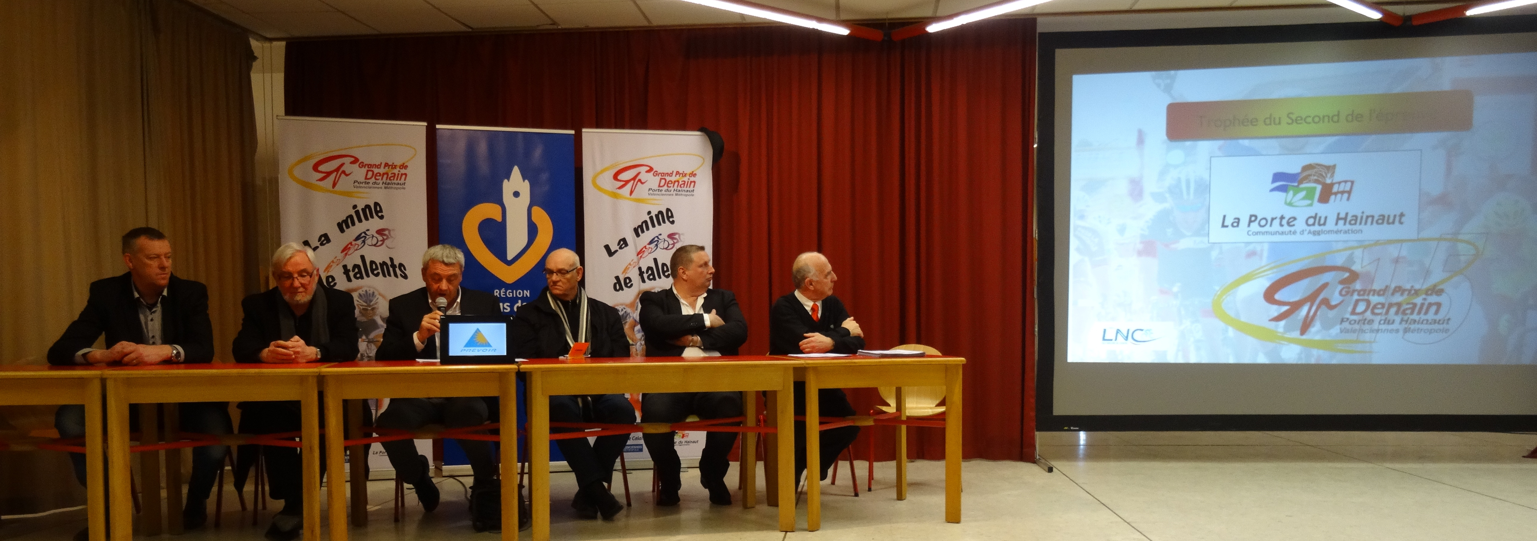 Conférence de presse de l'édition 2015 du Grand Prix de Denain le vendredi 13 février 2015, à partir de 19 h 30 min, dans la salle Aragon, à Denain, Nord, Nord-Pas-de-Calais, France.